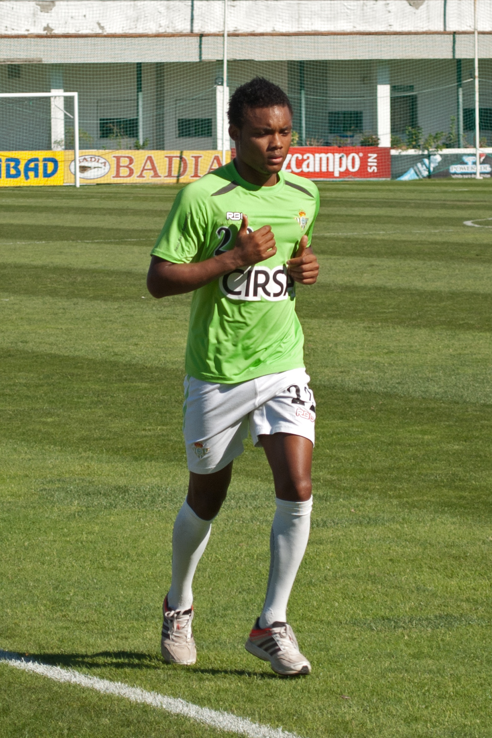 Nélson Augusto Tomar Marcos, durante un entrenamiento del Real Betis (temporada 2011/2012